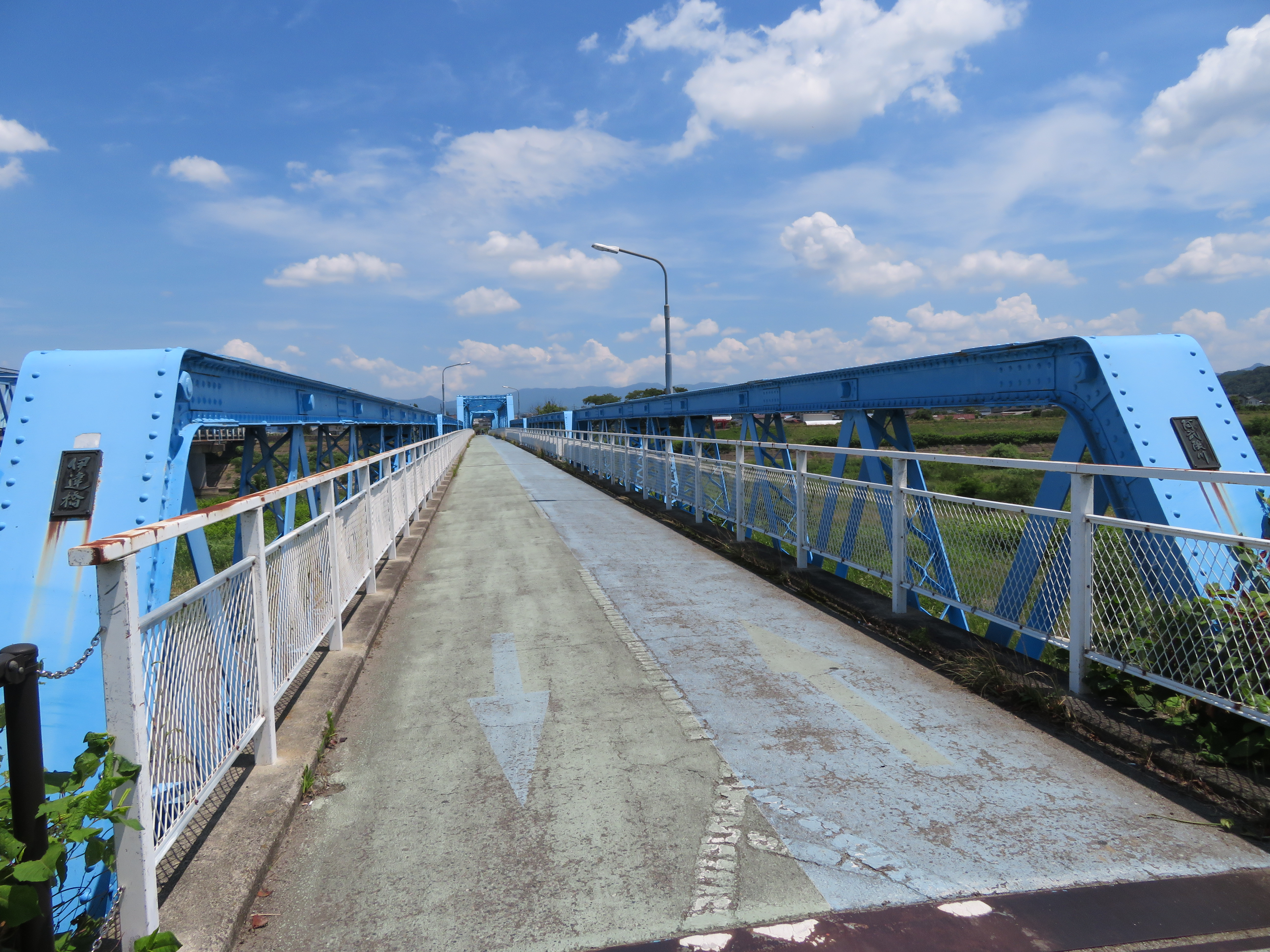 阿武隈川に架かる伊達橋（歩道橋、国道4号線側から撮影） Canon PowerShot SX720 HS